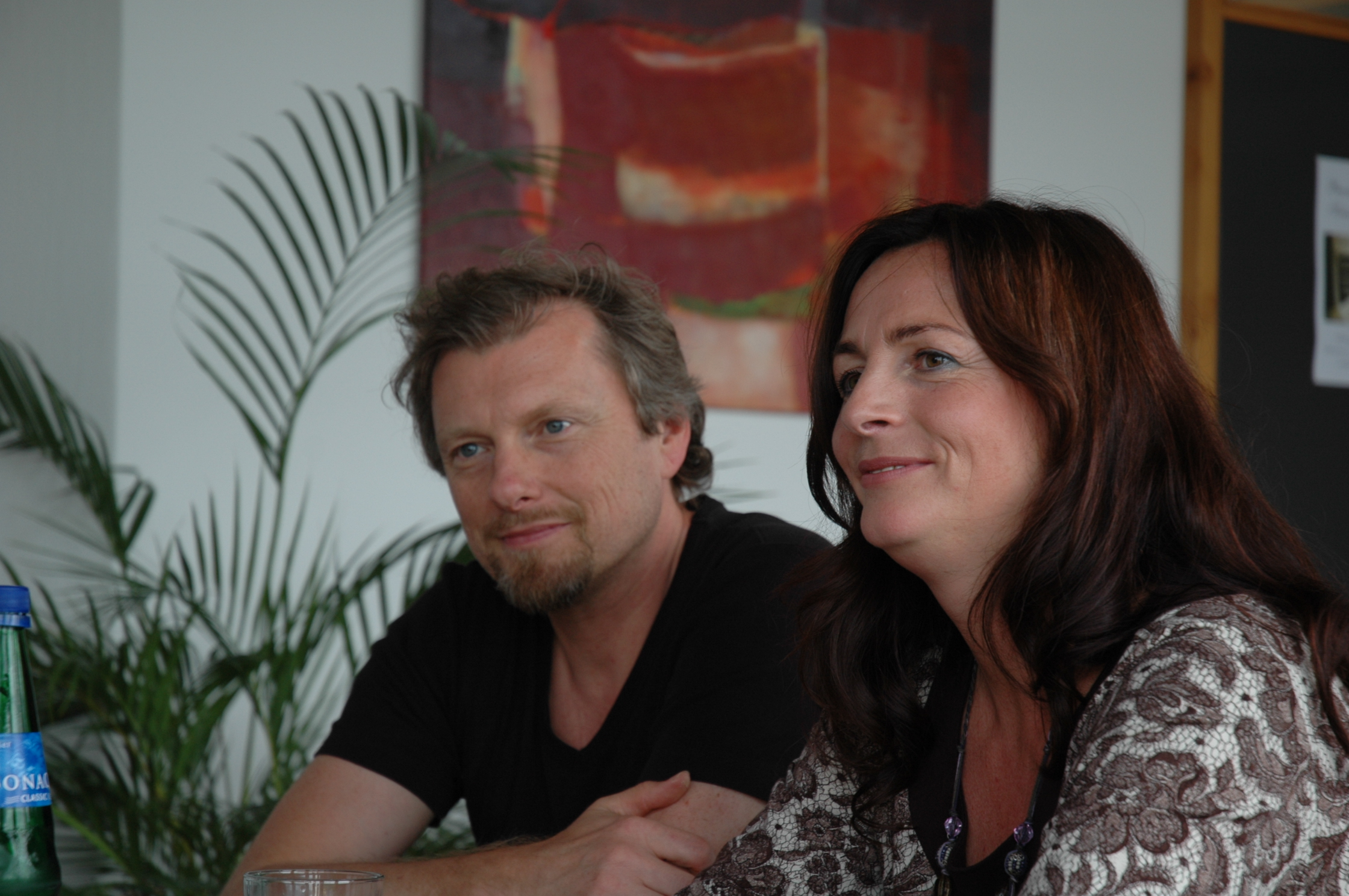 Die christlichen Musiker Andrea und Albert Frey bei einem Interview mit dem Christlichen Medienmagazin pro am 13. September 2010